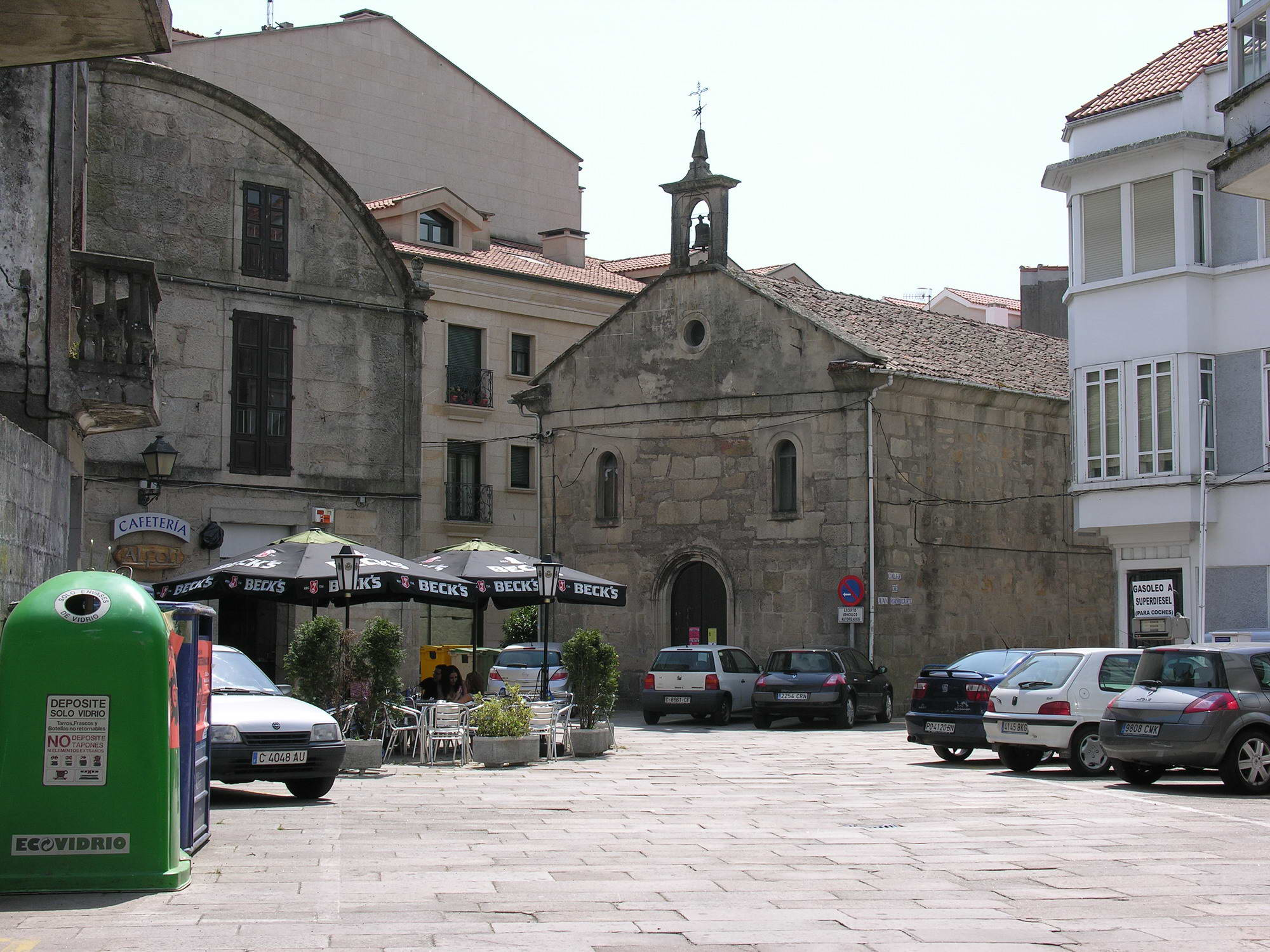 Padrón, Galicia Publish by= Luis Miguel Bugallo Sánchez.